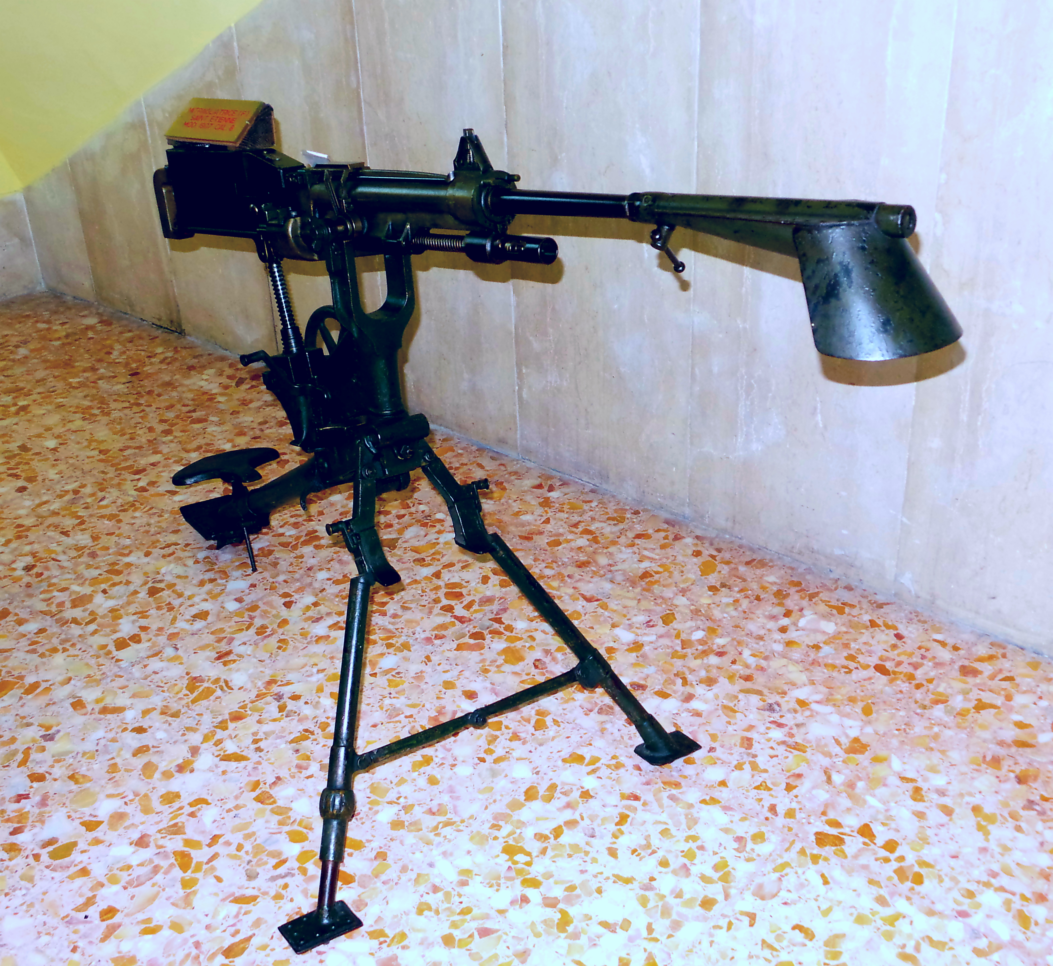 Maschinengewehr Saint Etienne Modell 1907, Kaliber 8 mm